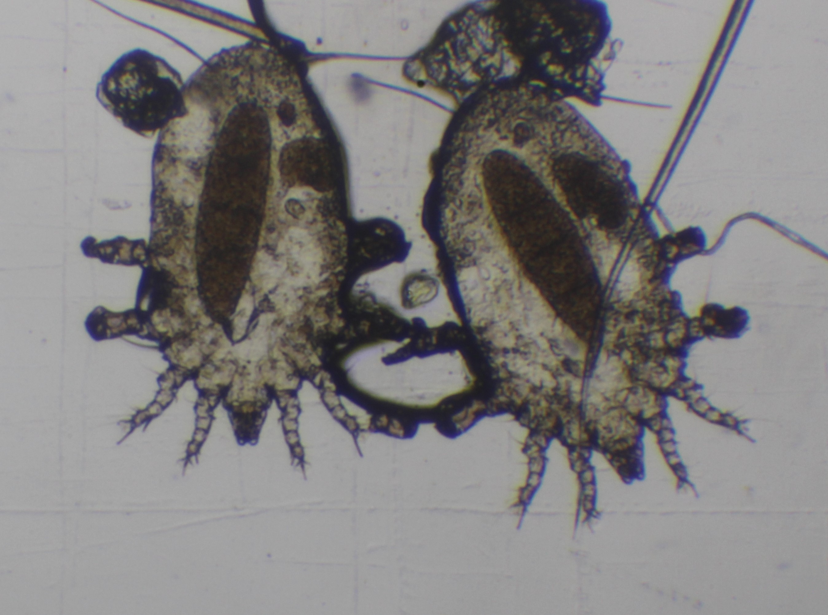 Самиці мишачого кліща, які мають у собі яйце